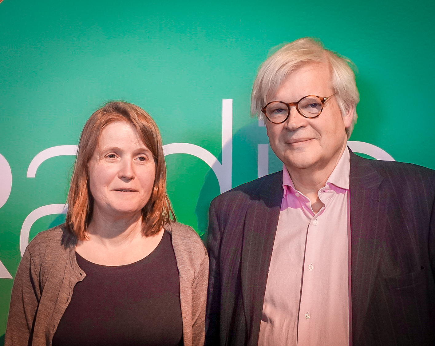 Louise Epstein och Thomas Nordegren i Nordegren & Epstein i P1 under en inspelning på Kulturhuset Stadsteatern i Stockholm den 26 april 2018.